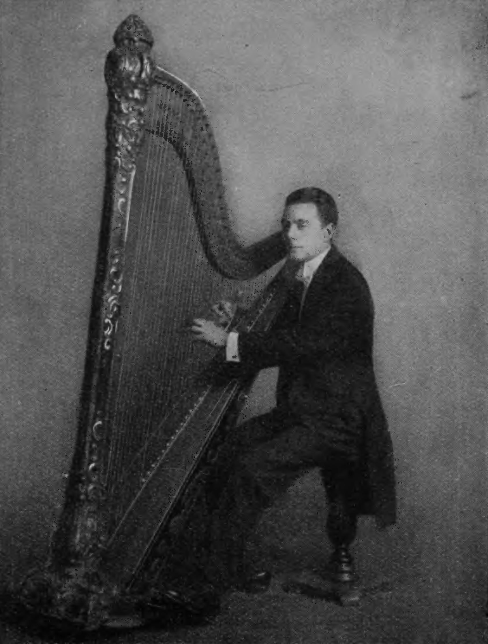 Charles SchuetzeN. Y. Philharmonic Orchestra